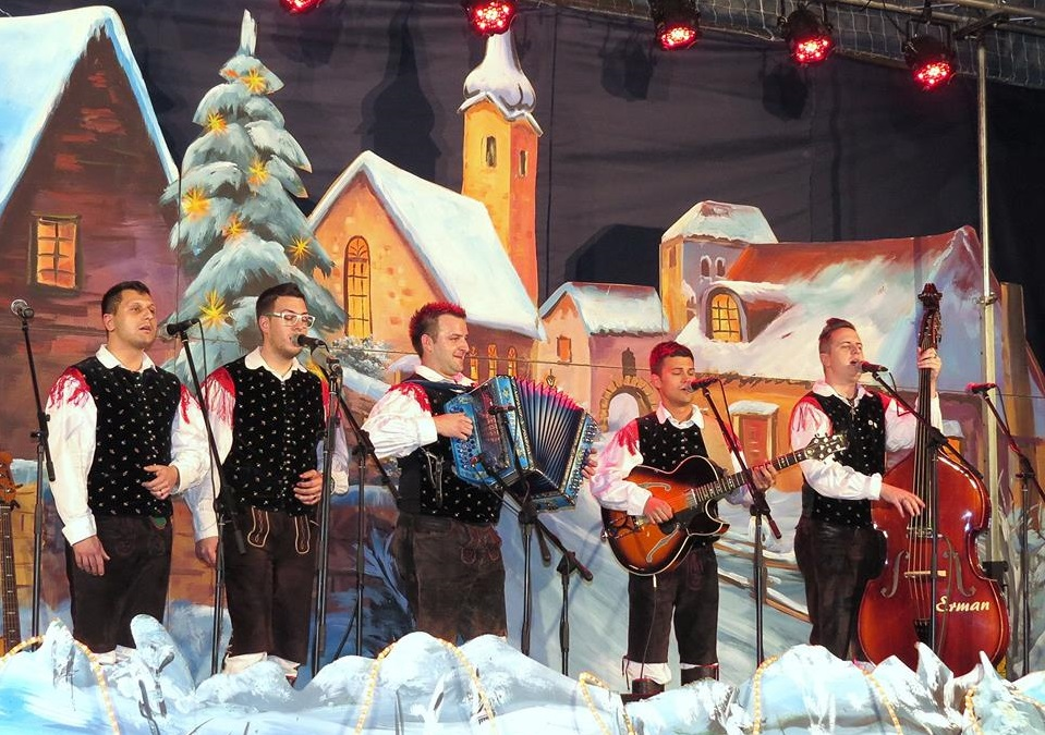 Ansambel Vikend na koncertu Vrtov večer v Oplotnici.